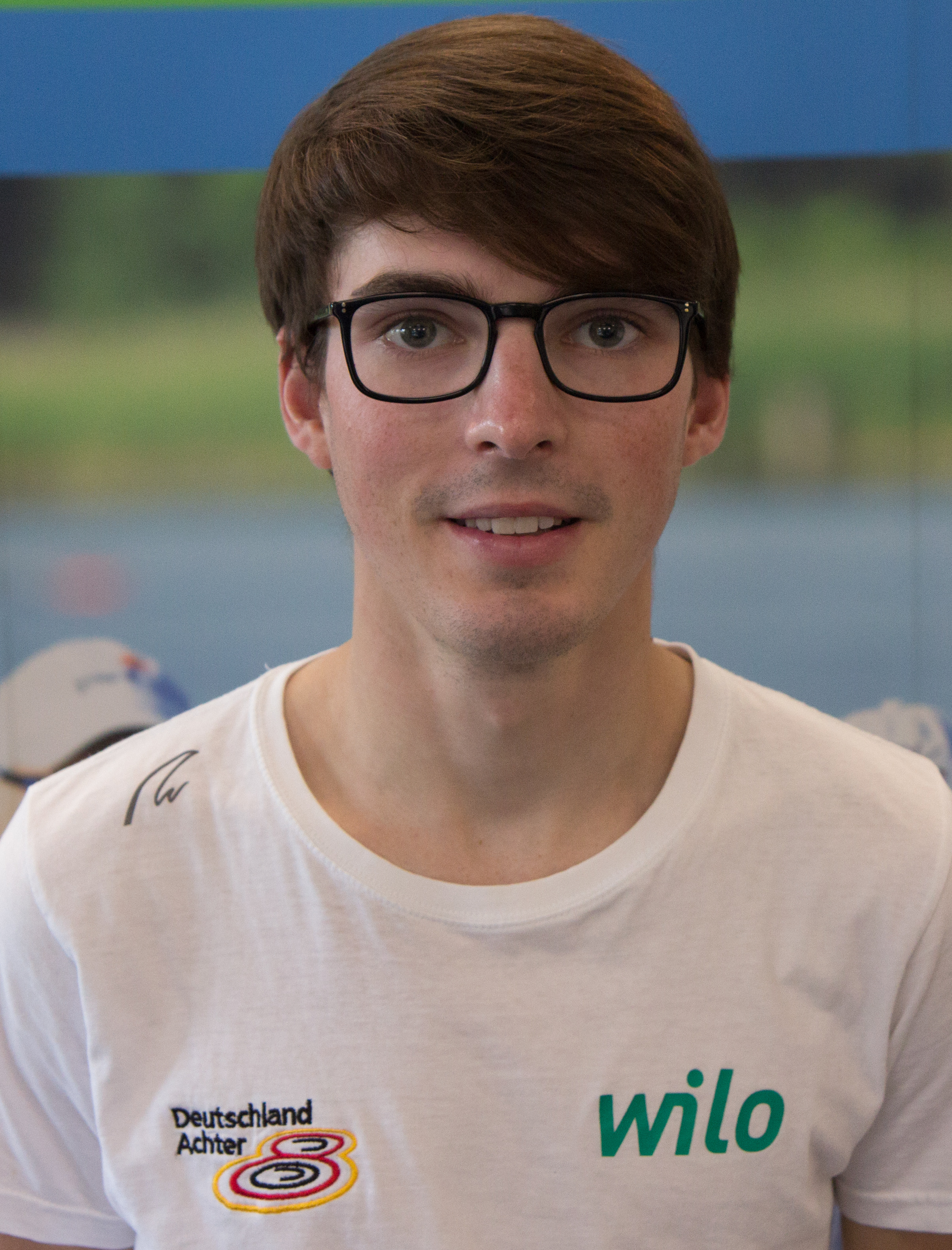 Medientag des Ruderverbandes in der Ruderakademie Ratzeburg am 6. September 2017: Jonas Wiesen